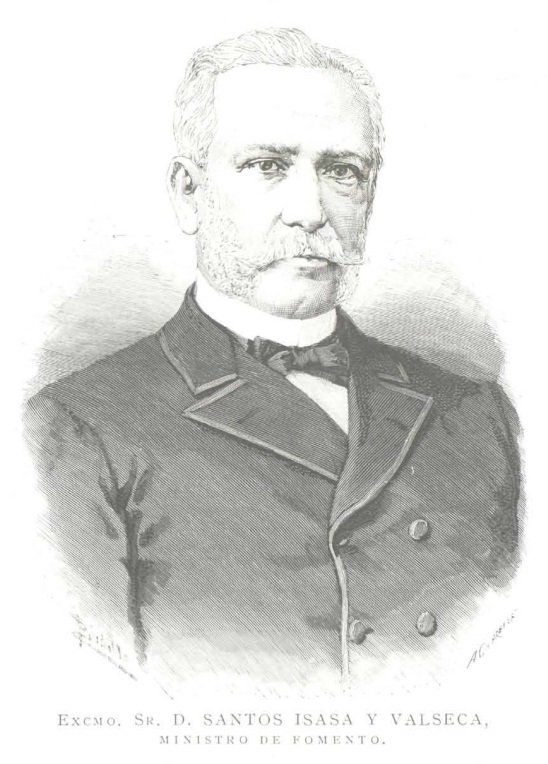 Excmo. Sr. D. Santos Isasa y Valseca, ministro de Fomento.